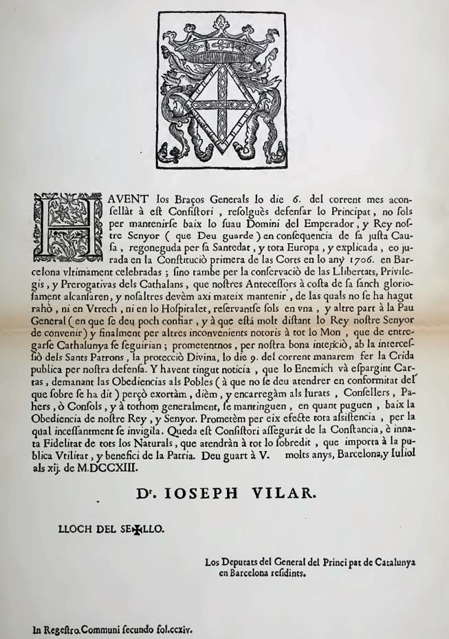 Notificación de la resolución de continuar la guerra